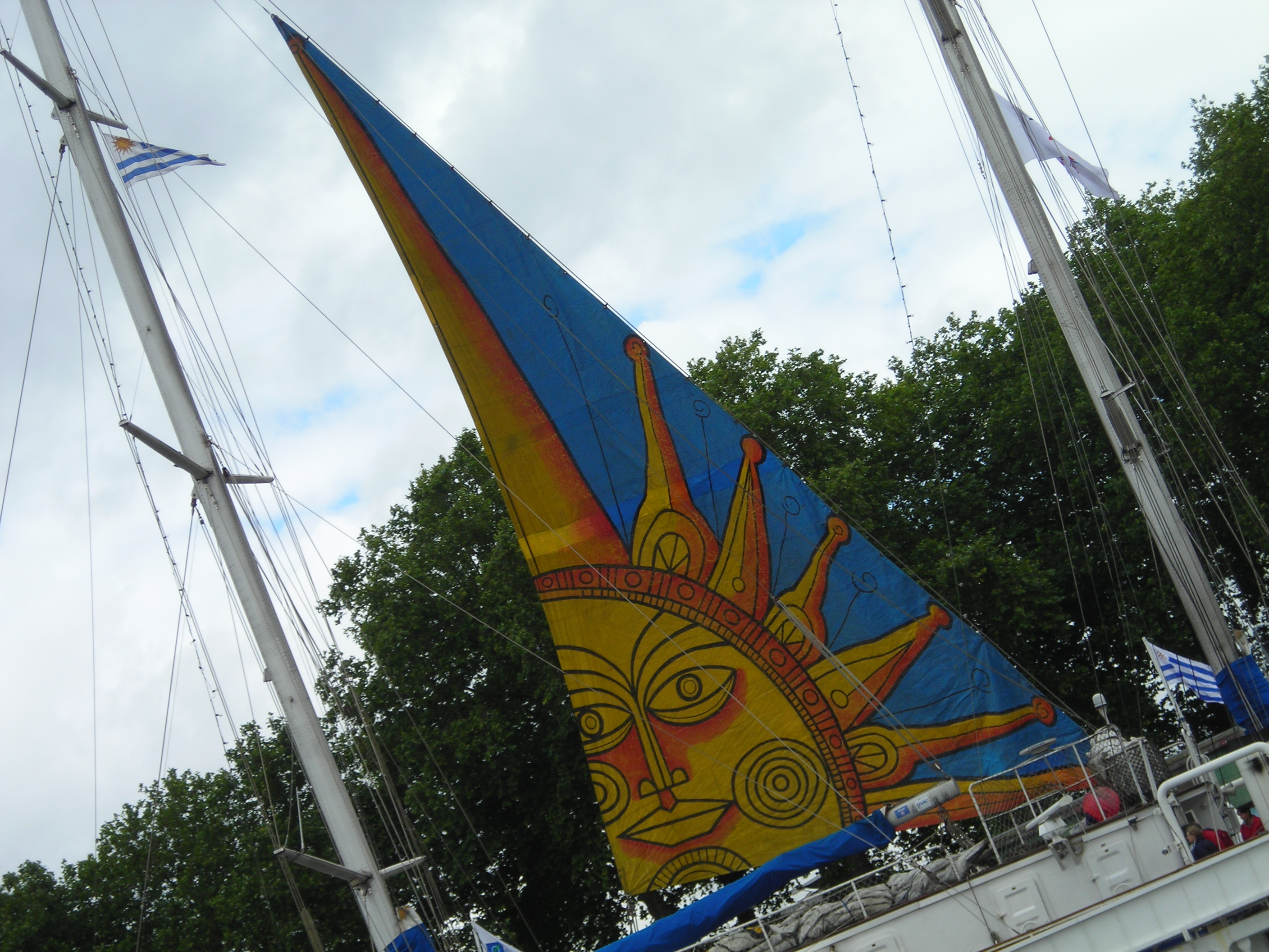 Détail de la voile du Capitan Miranda, navire urugayen